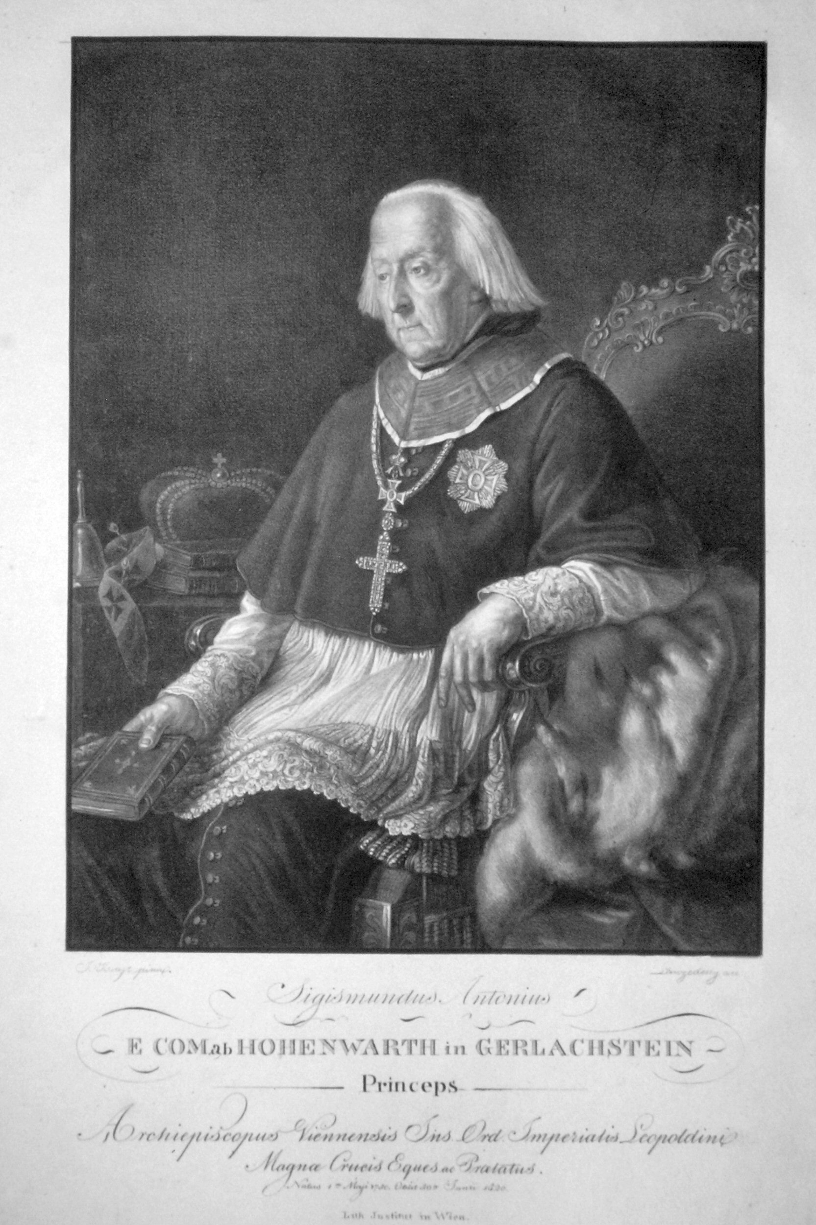 Sigmund Anton Hohenwart (1730-1820), Jesuit, Religionslehrer des Kaiser Franz I., Bischof von Triest und St. Pölten. Kardinal Erzbischof von Wien. Lithographie von Josef Lanzedelli d. Ä., um 1820, nach einem Gemälde von Johann Krafft.